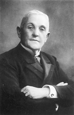 Dawid Abrahamowicz (1839-1926), fundator Zakładu Wychowawczego we Lwowie